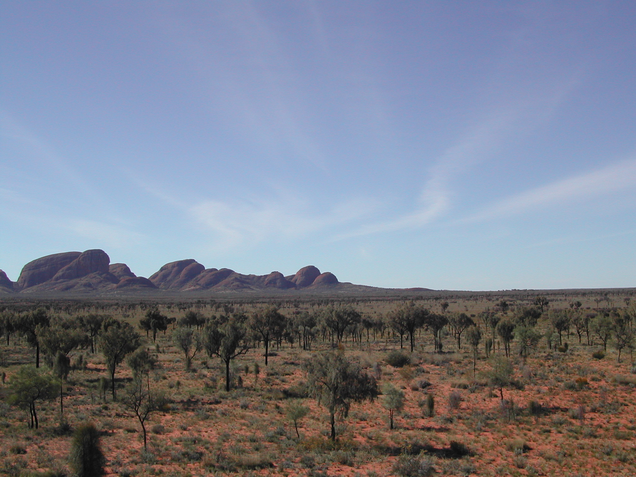 Den Kings Canyon am Wattarka Nationalpark.